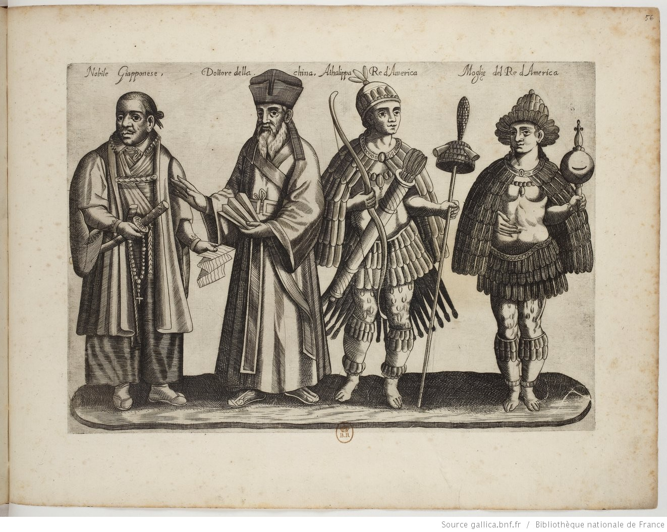 Noble Japonais, Docteur chinois, Athalippa Roi d' Amérique, Femme du Roi d' Amérique